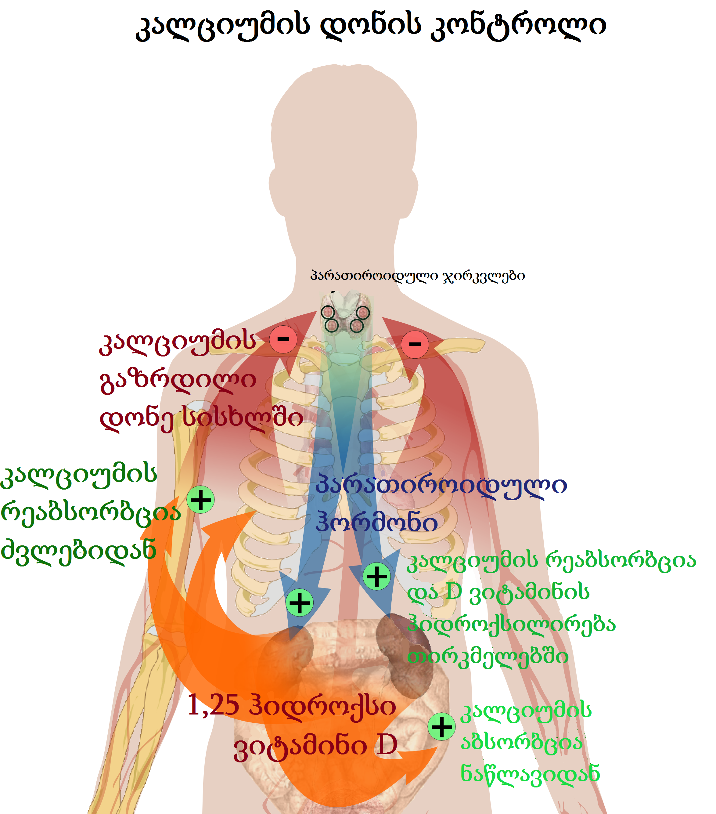 კალციუმის დონის რეგულაციის მიმოხილვა